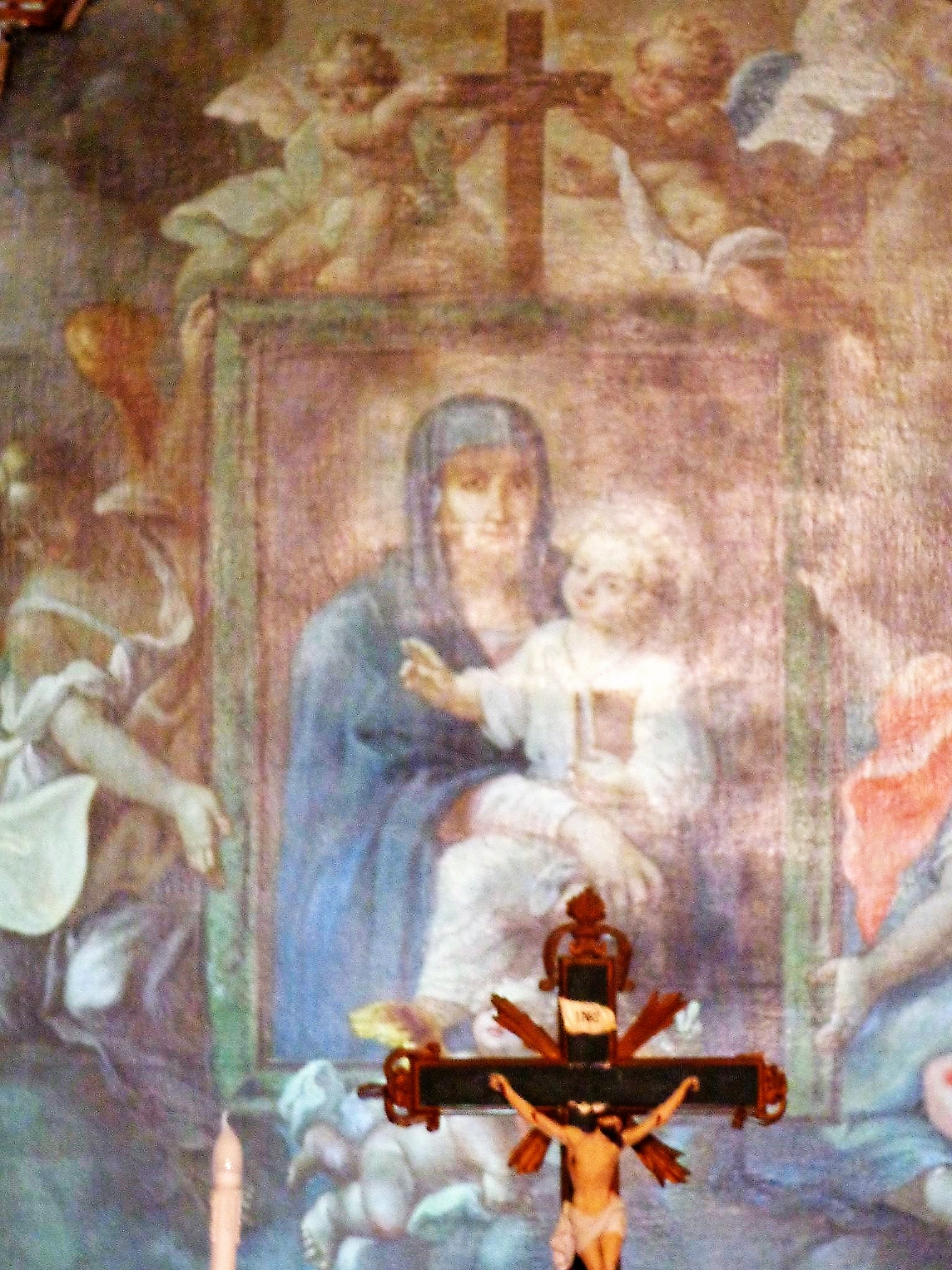 Dettaglio pala d'altare, foto già presente su account personale FB